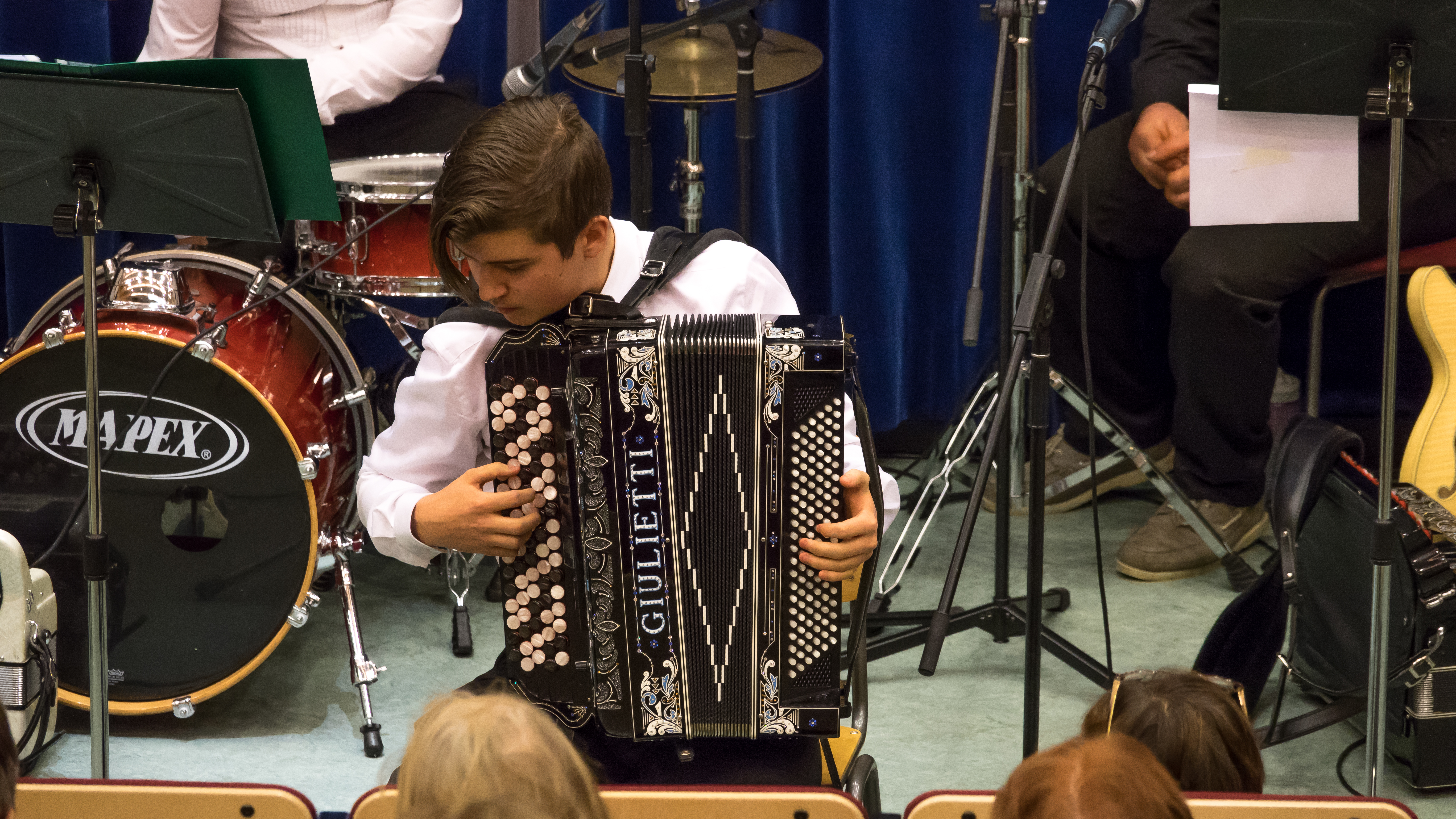 Marko esiintymässä vuonna 2019